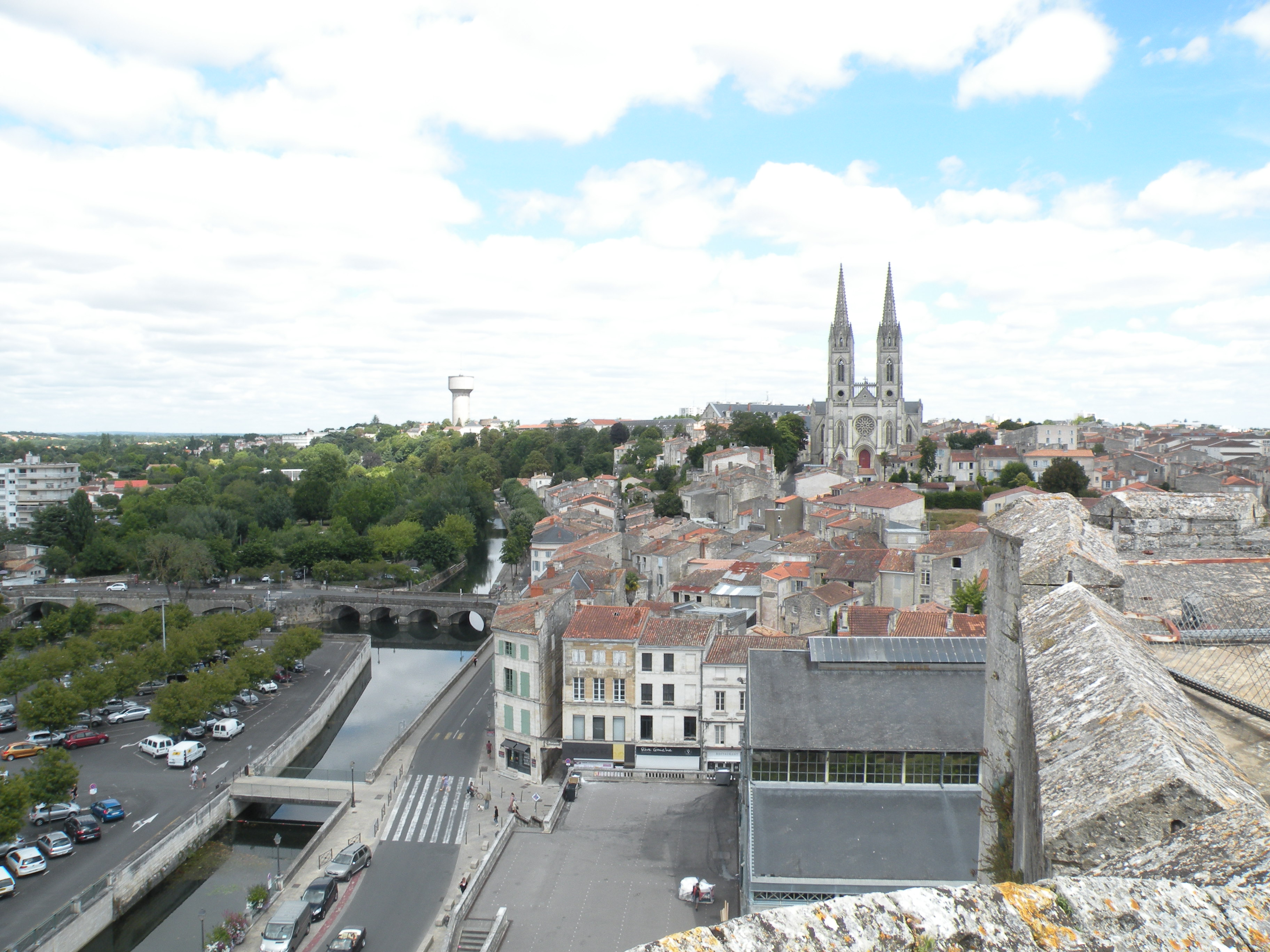 vue sur niort depuis le Donjon de Niort